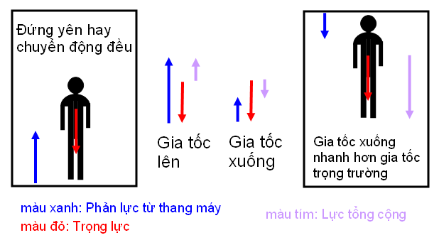 Bài toán thang máy trong cơ học cổ điển. Tự vẽ bởi người truyền lên.